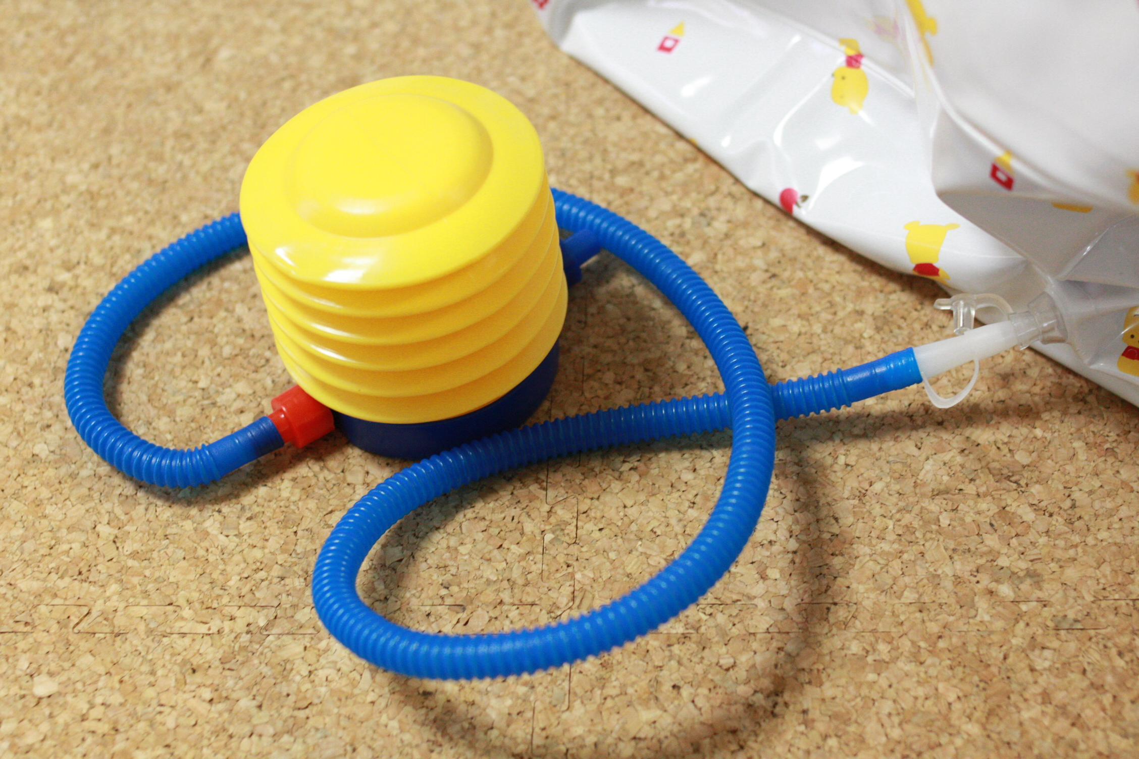 よくある黄色い空気入れで空気を抜く方法